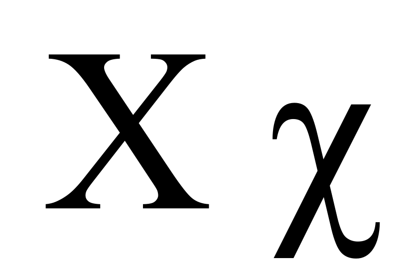 greek letter chi